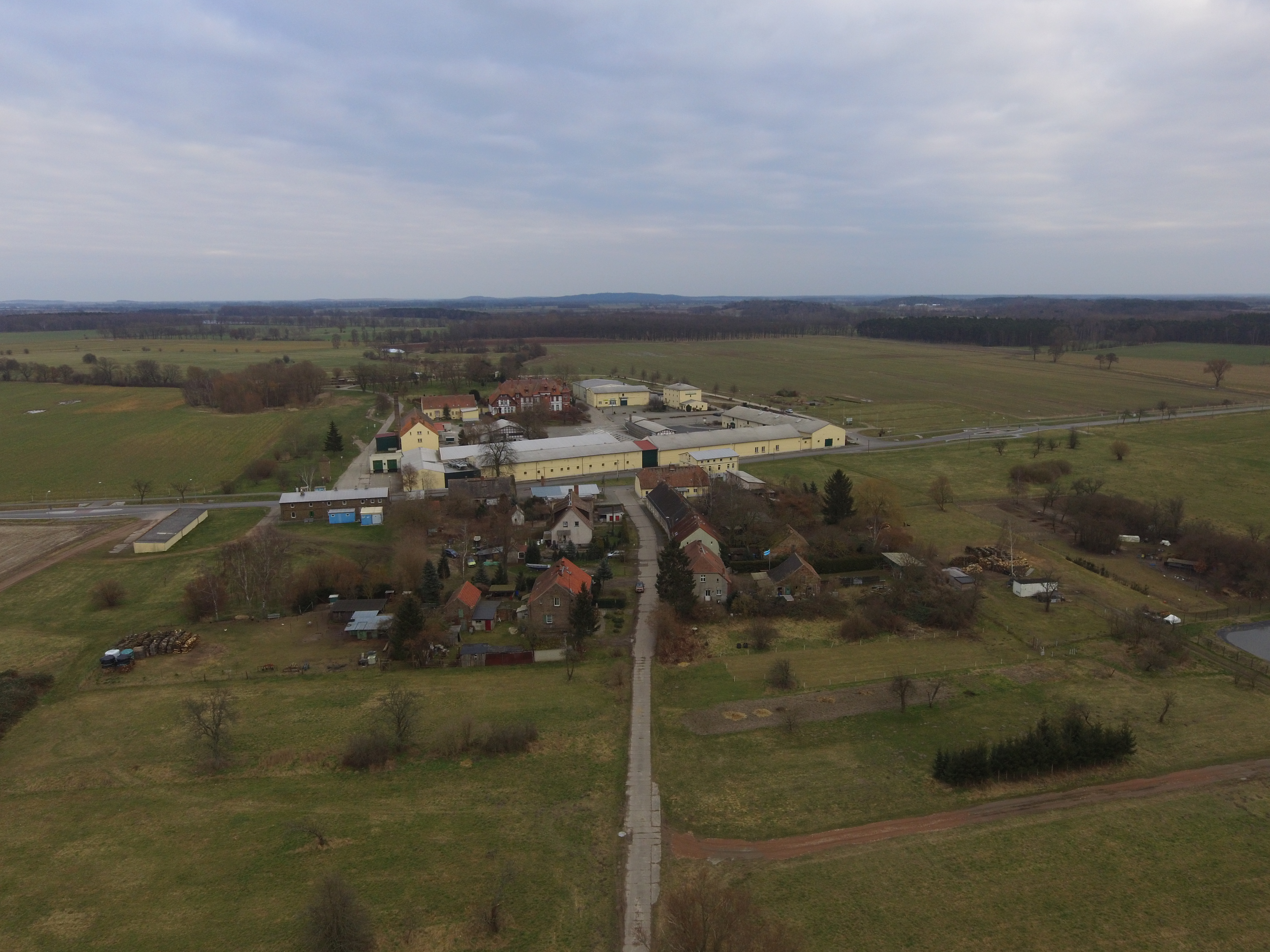 Mötzow Luftbild